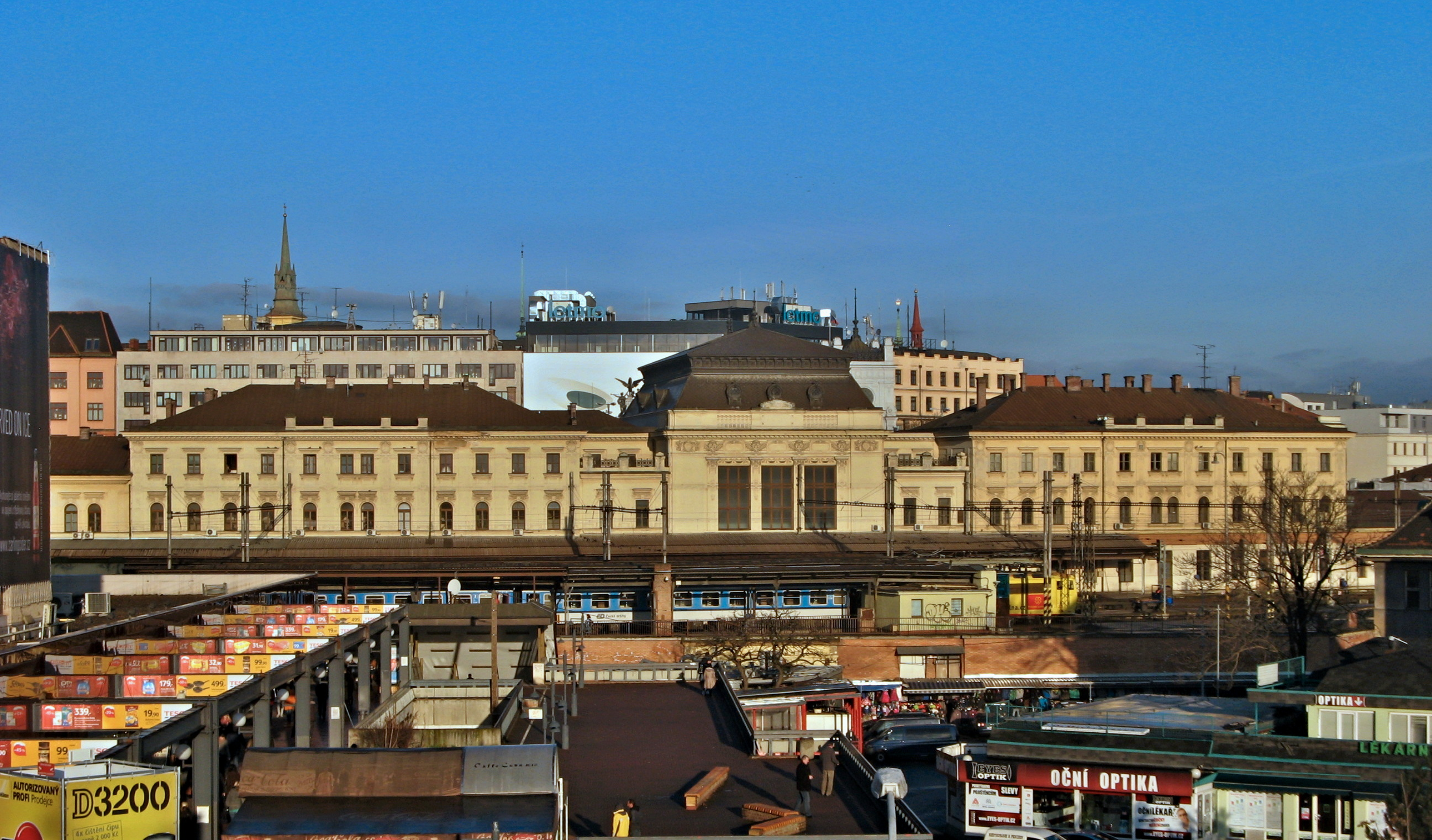 Budova hlavního nádraží v Brně, pohled z Vaňkovky